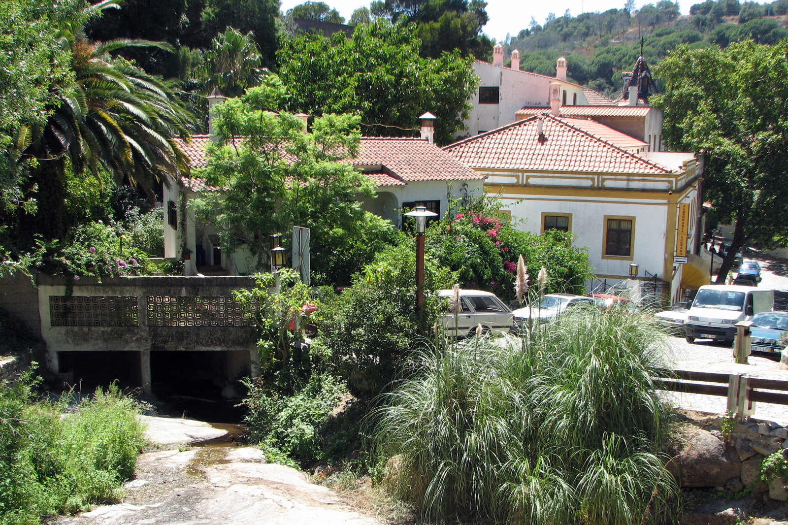 Caldas de Monchique - The Algarve, Portugal